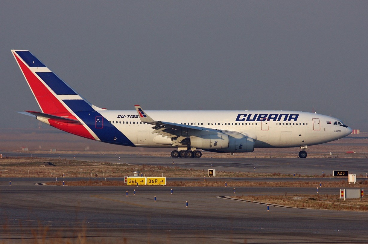 Cubana IL-96 taxiing at Madrid